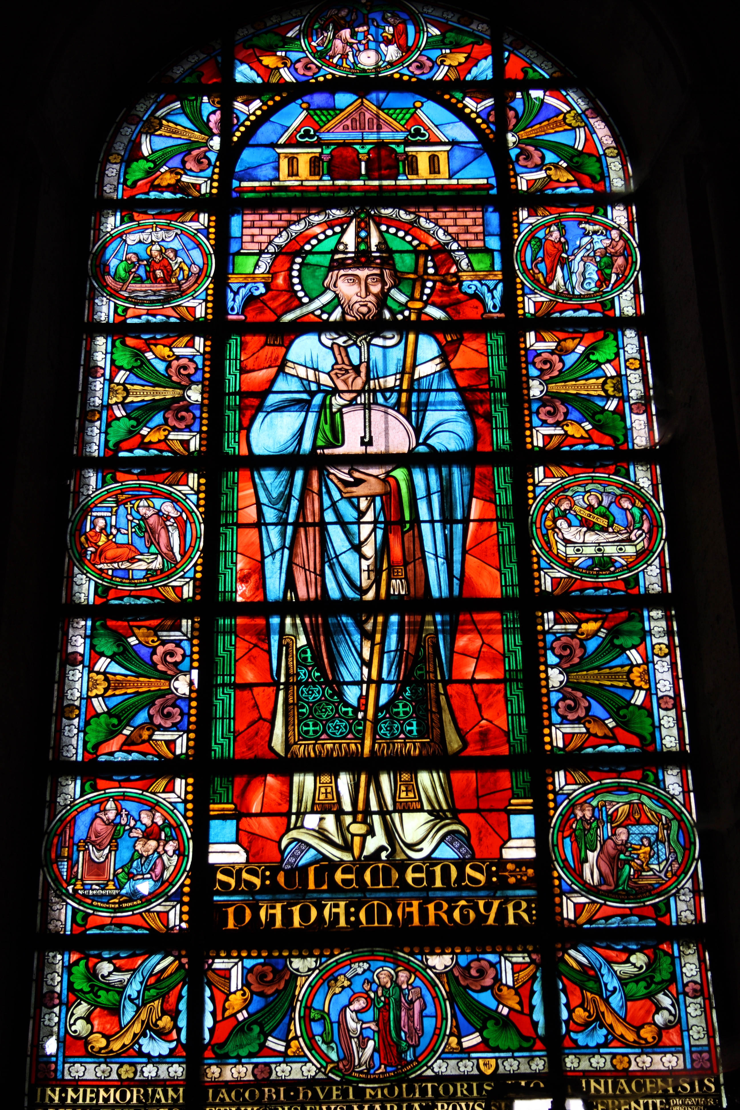 Katholische Pfarrkirche Notre-Dame-du-Fort in Étampes im Département Essonne in der Region Île-de-France (Frankreich), Bleiglasfenster von Alfred Gérente, um 1868; Darstellung: hl. Clemens von Rom; Signatur: GERENTE ?